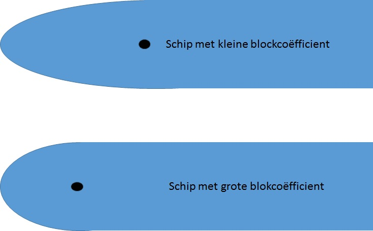 Vergelijking van 2 schepen met verschillend blockcoefficient